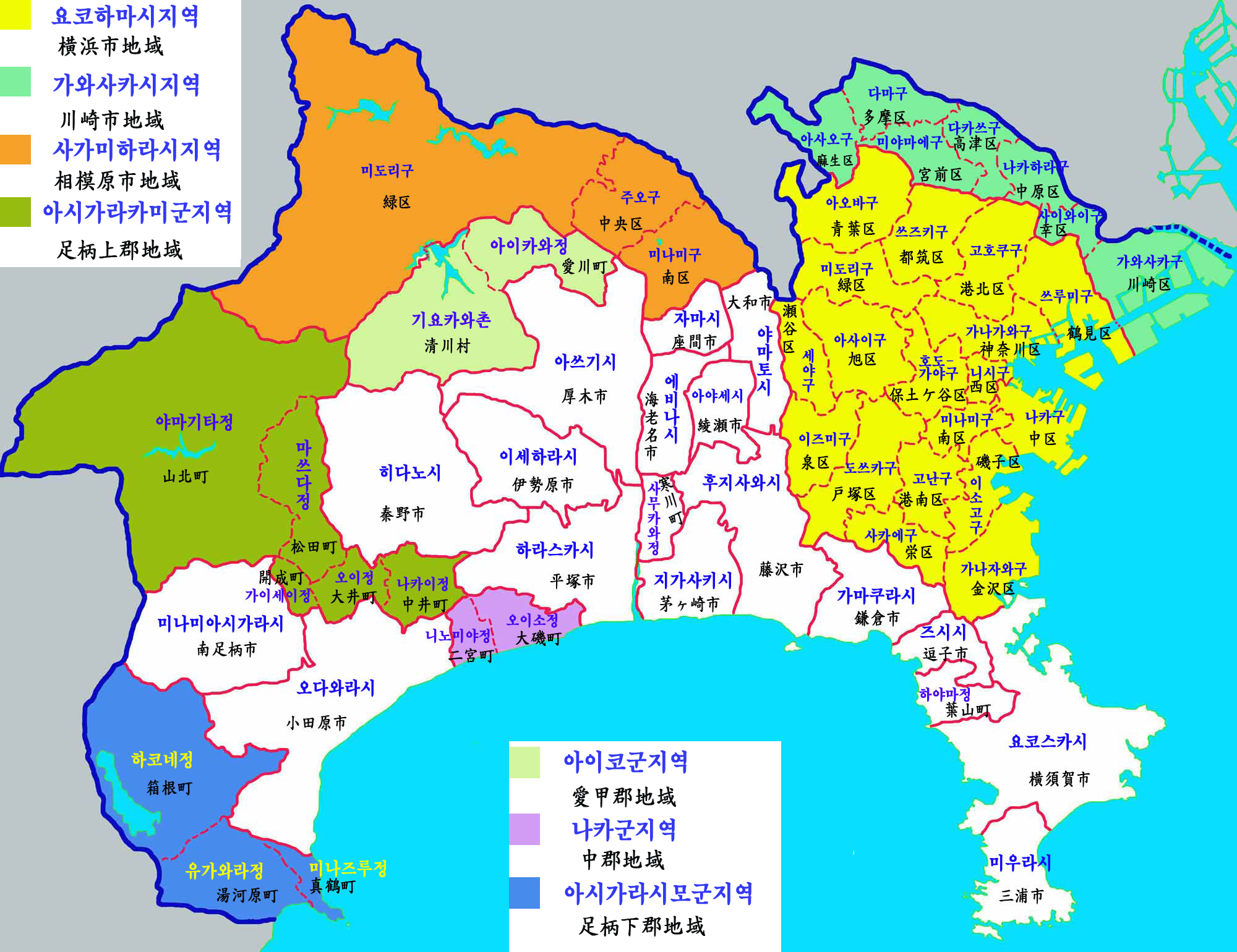 가나가와현 행정구역도